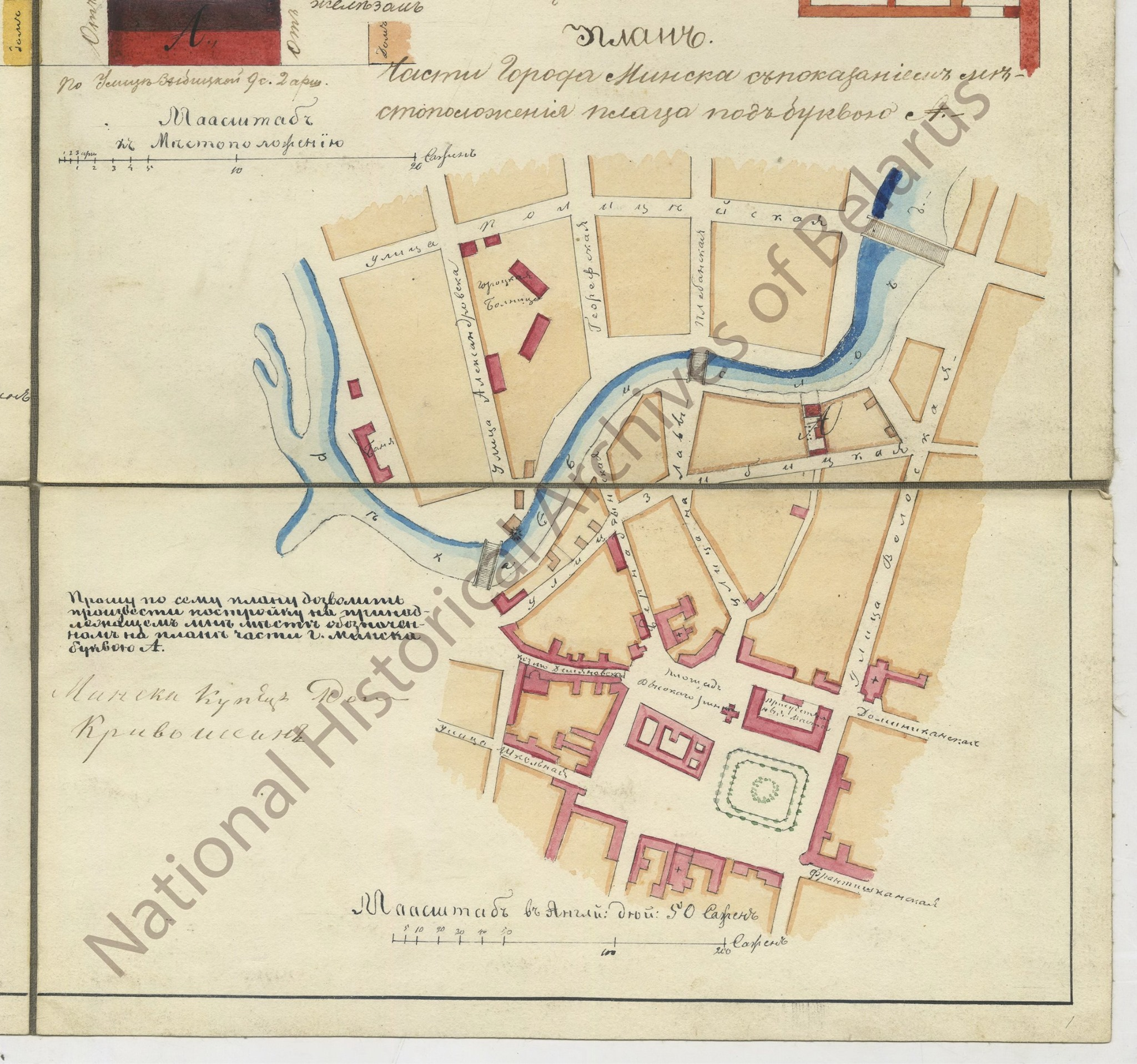 Беларуская (тарашкевіца): Менск (Miensk), Высокі Рынак (Vysoki Rynak). Плян